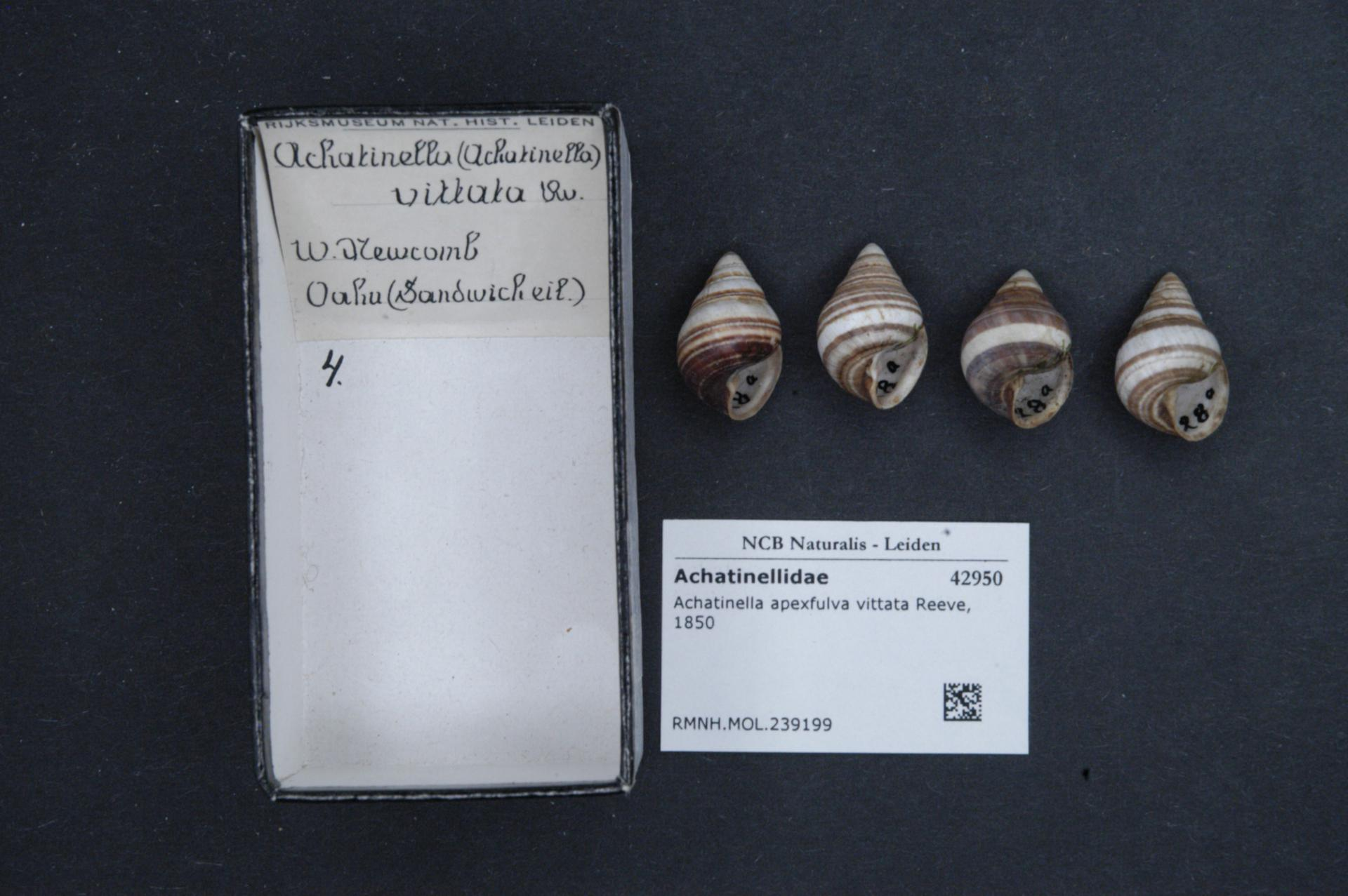 Achatinella apexfulva vittata Reeve, 1850